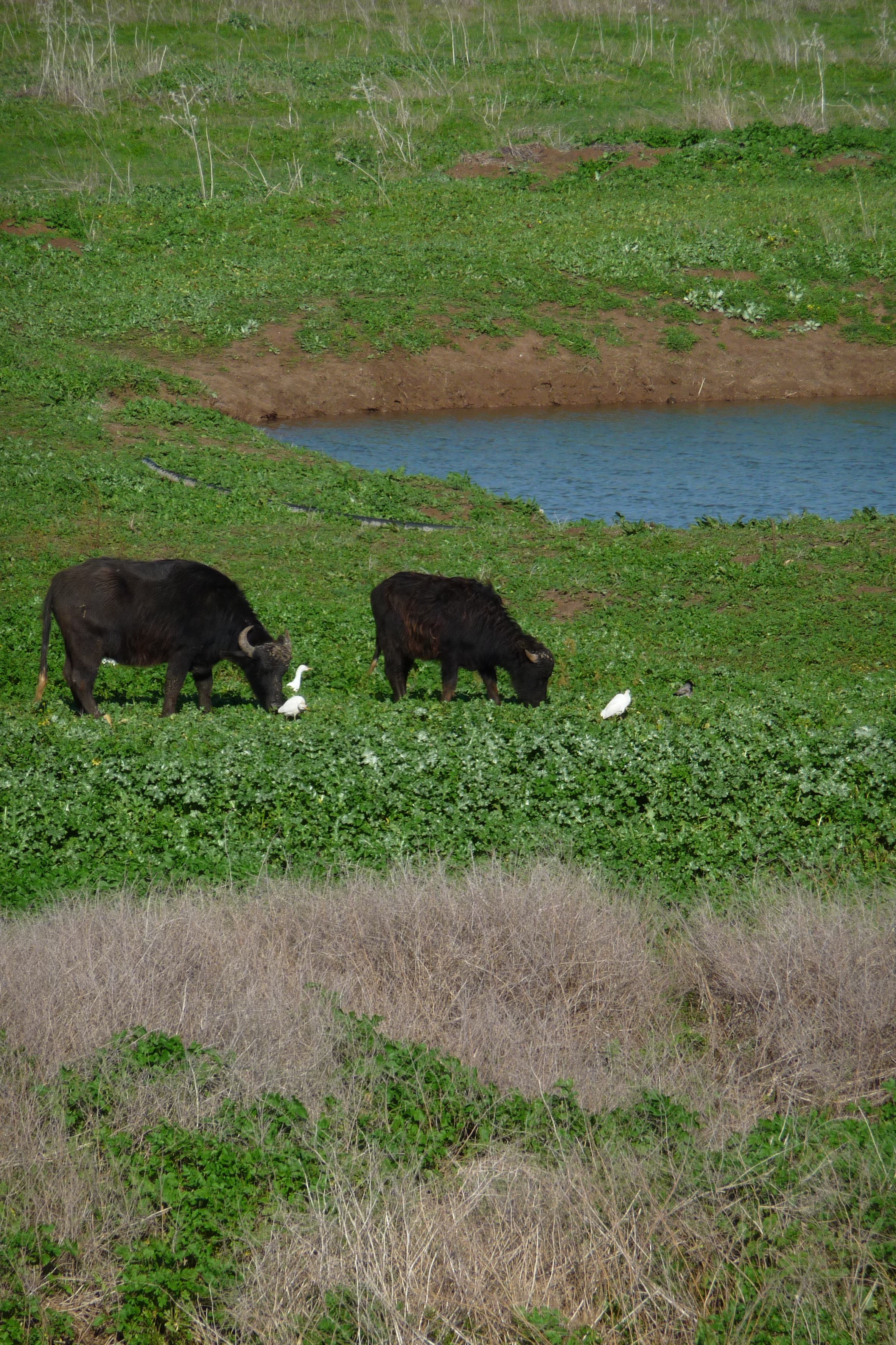 שמורת טבע בעמק זבולון, מזרחית לקריית ביאליק. השמורה כוללת הן את המעיינות והביצות המהווים את מקורו של נחל נעמן והן את האתר הארכאולוגי תל אפק. השמורה הוכרזה ב-1979 והיא משתרעת על פני 660 דונם. ב-1996 הוכרה השמורה כ"אתר רמסר" בהתאם לאמנת רמסר לשימור ולפיתוח בר-קיימא של בתי גידול לחים.